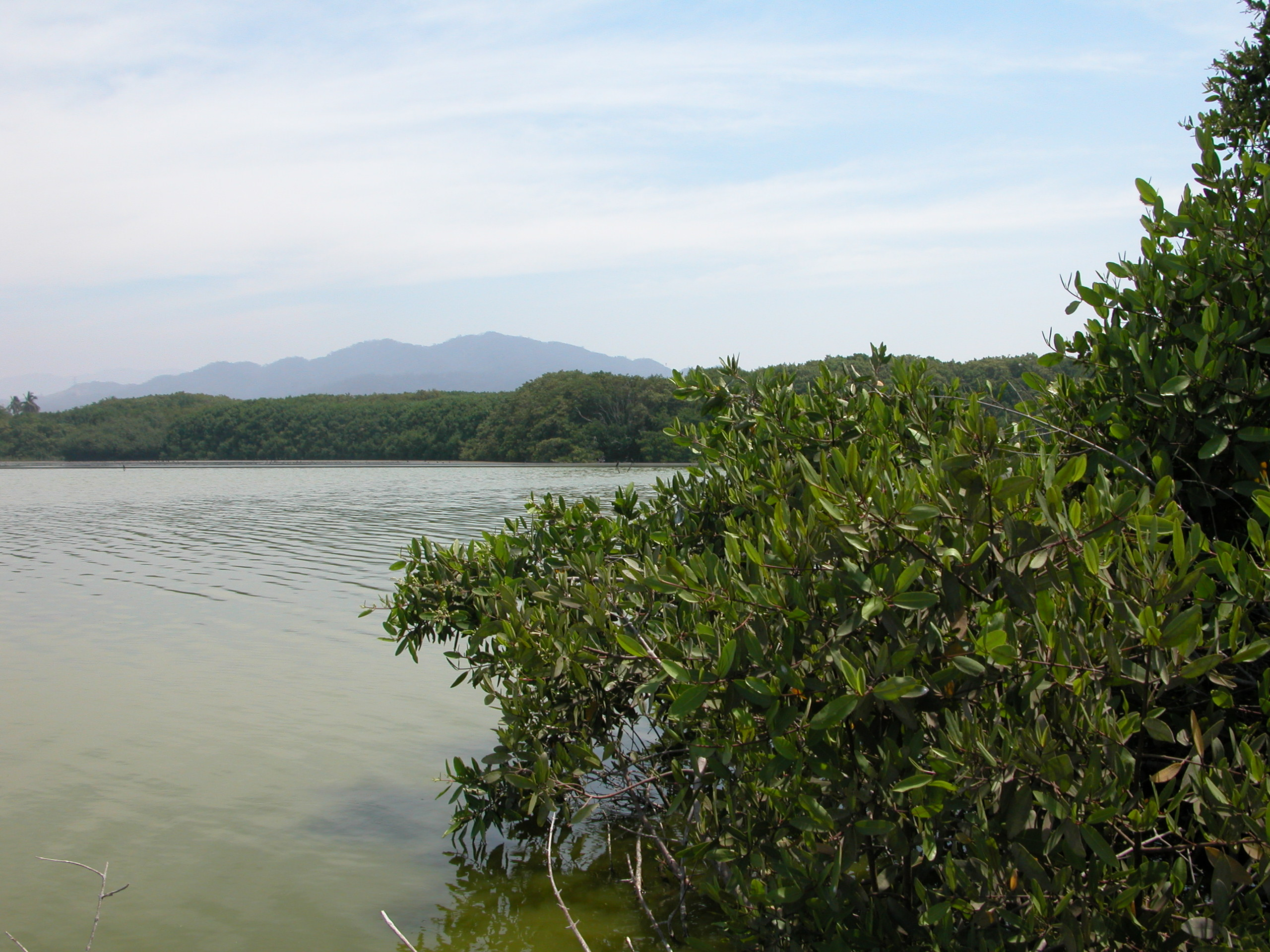 Vista 2 de la Laguna de las Garzas en Manzanillo, Colima, México